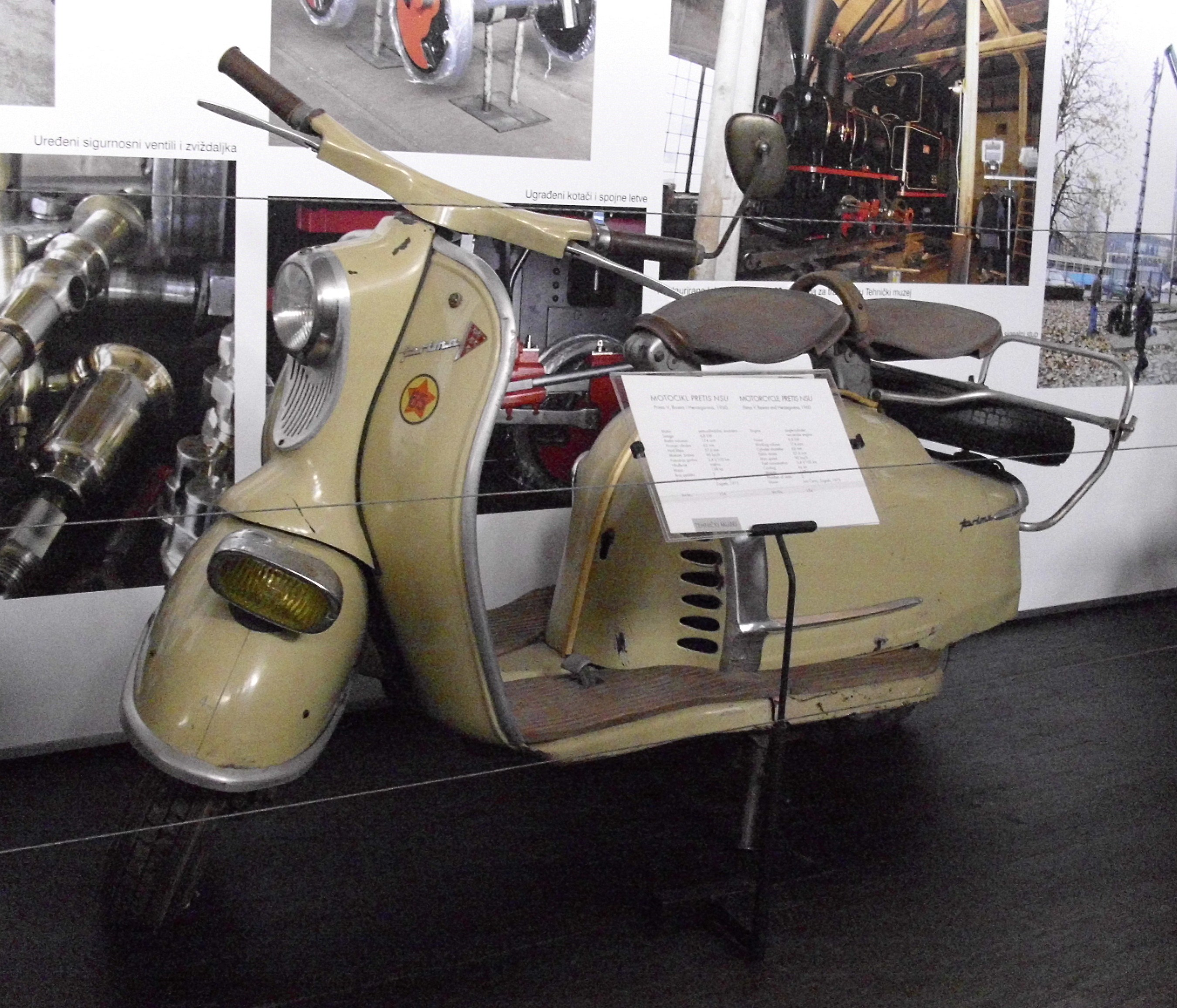 Pretis-NSU Prima V Motorrad von 1960 im Technikmuseum von Zagreb